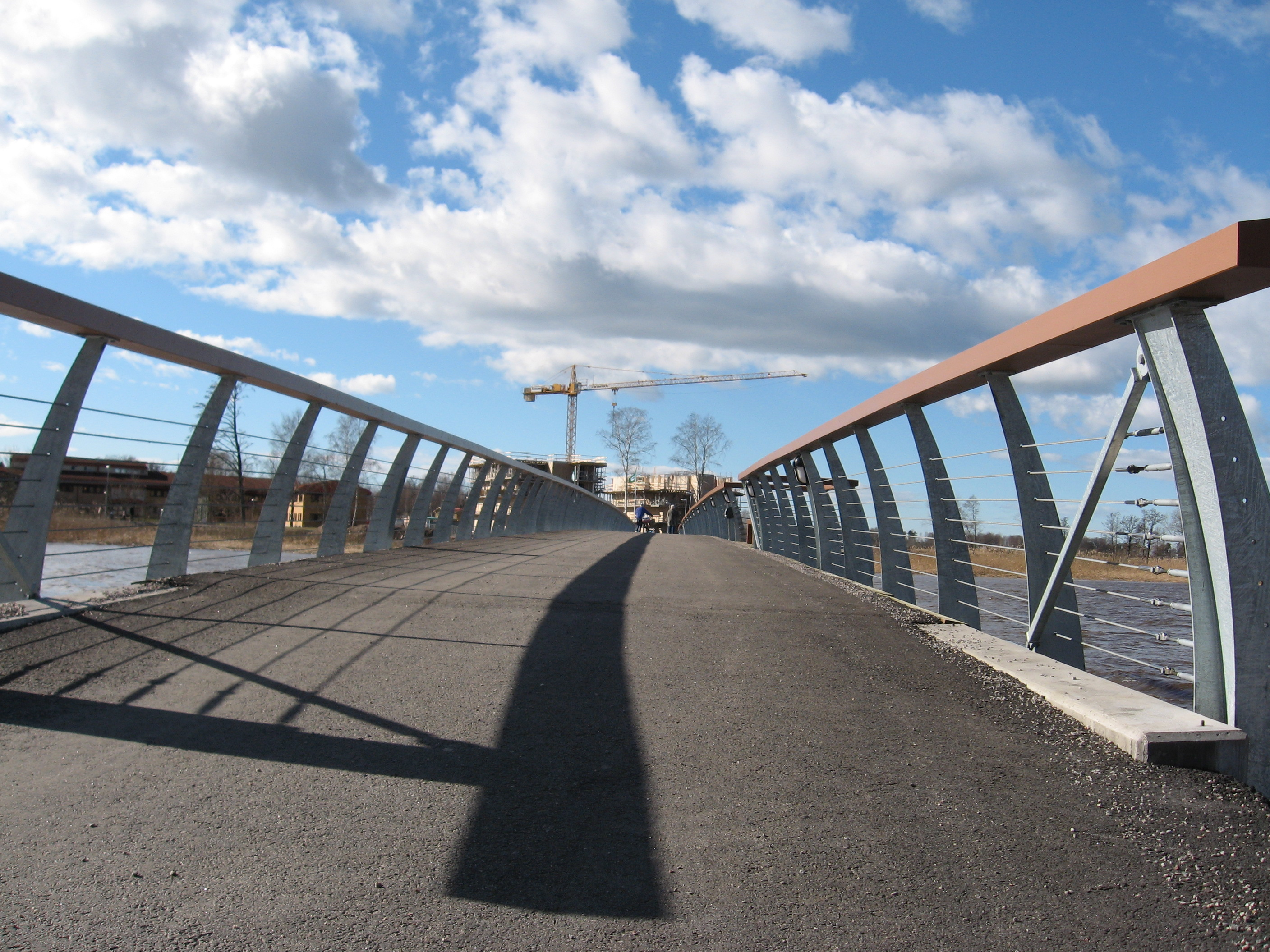 Bro i Mariestad